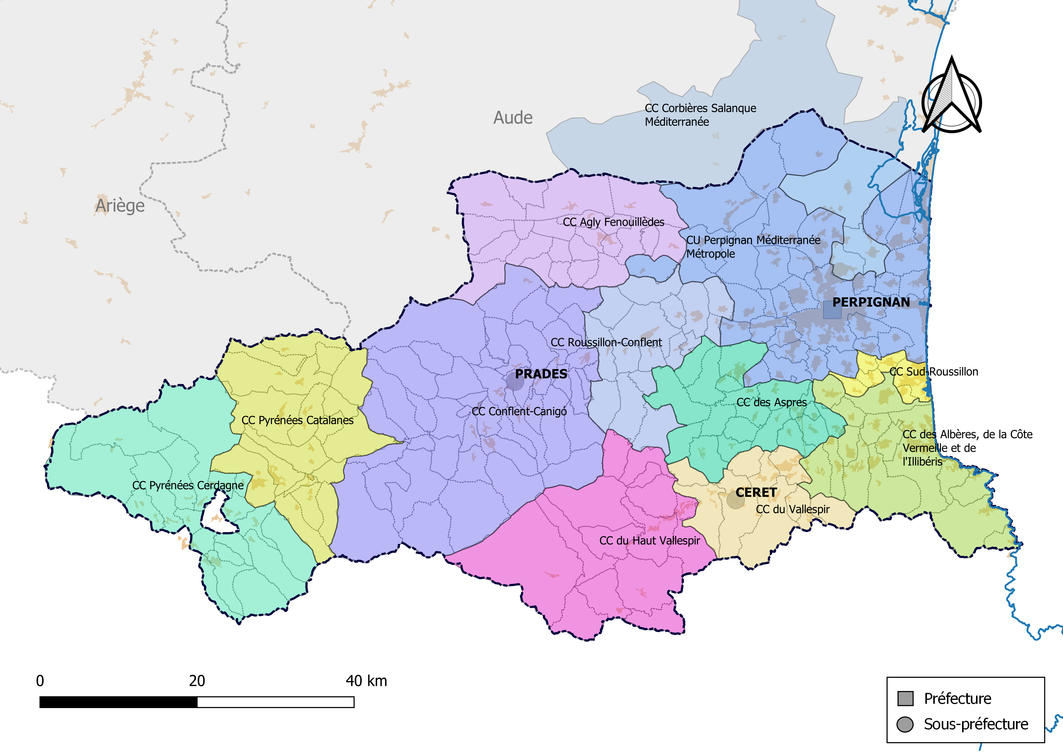 Carte des intercommunalités du département des Pyrénées-Orientales, France. Composition au 1er janvier 2019.